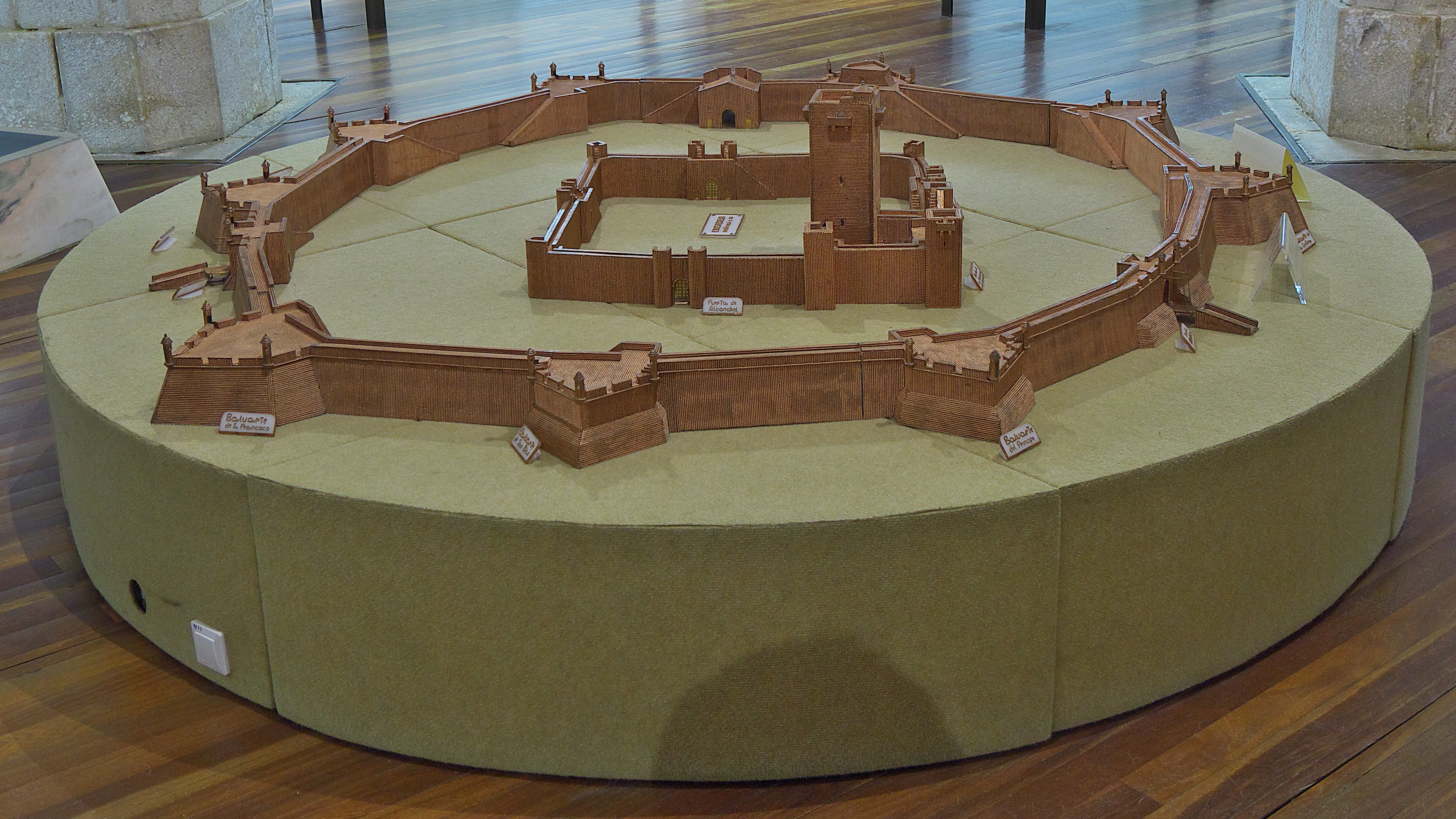 Por el Tratado de Alcañices (1297), Olivenza pasa a pertenecer a Portugal. El rey don Dinis (Dionisio I de Portugal) decide amurallar la población. Durante la Guerra de Restauración portuguesa (1640-1668), Felipe IV de España construye un recinto amurallado con modelo de las Fortificaciones de Vauban (1641).